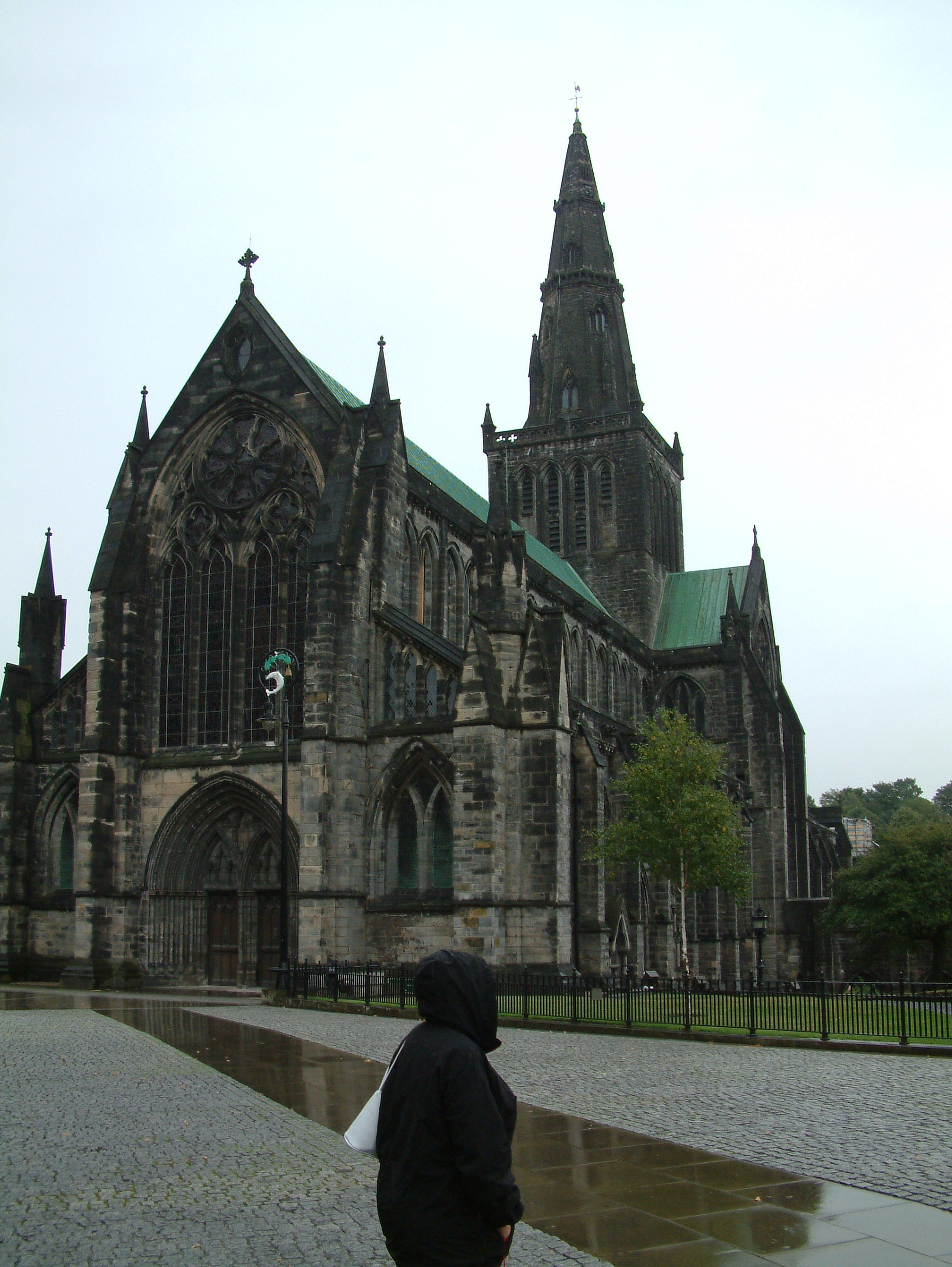 Katedrala sv. Munga z venku